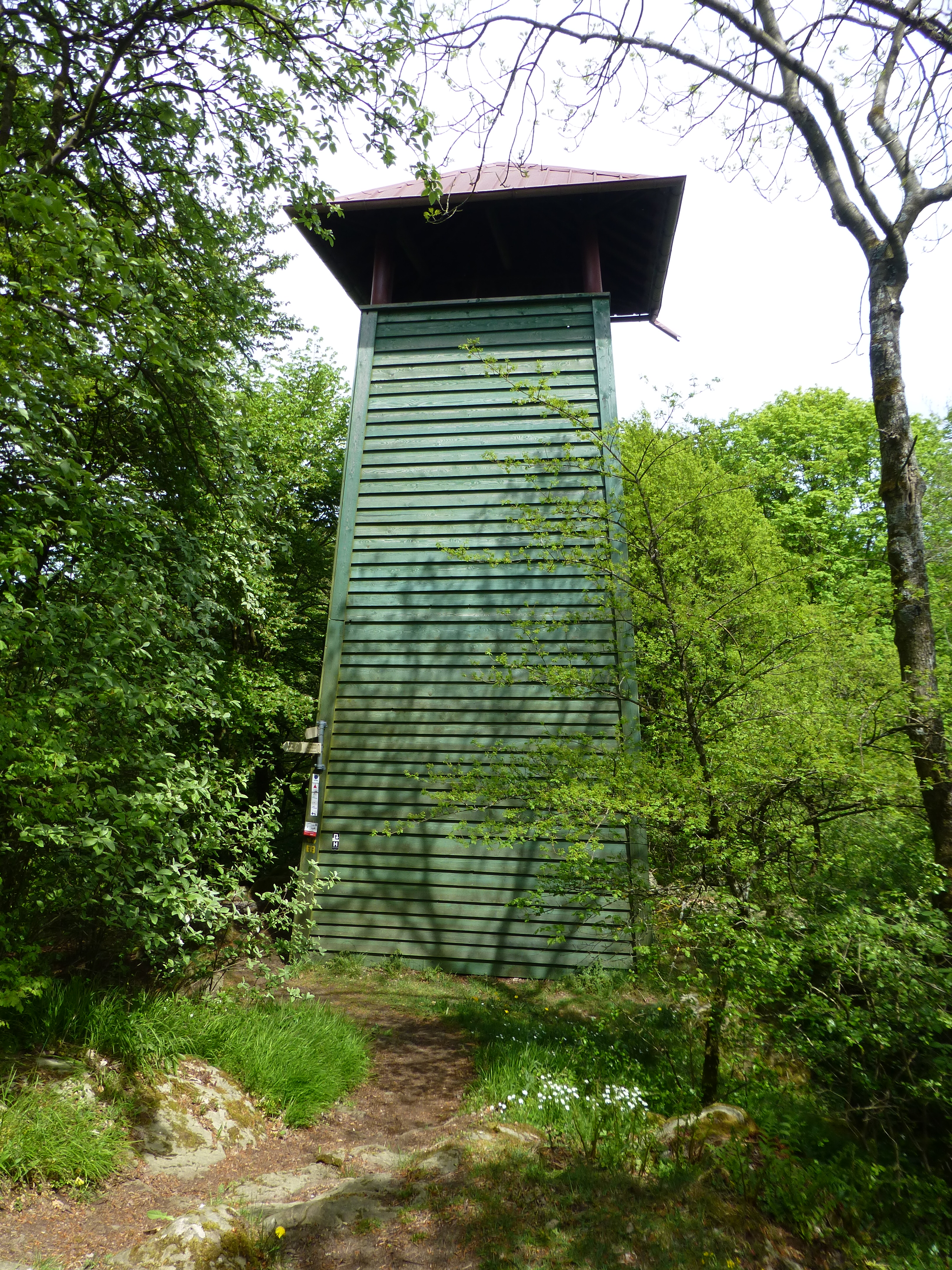 Hünsteinturm bei Holzhausen